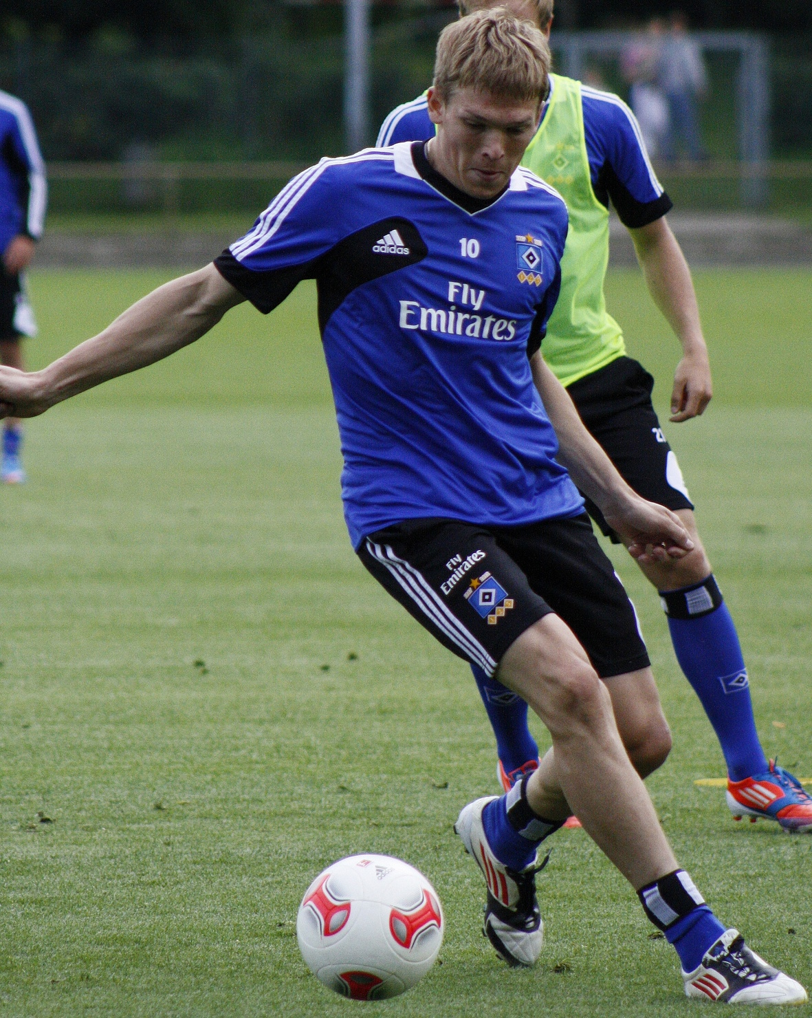 Artjoms Rudņevs beim Training des HSV am 7. August 2012